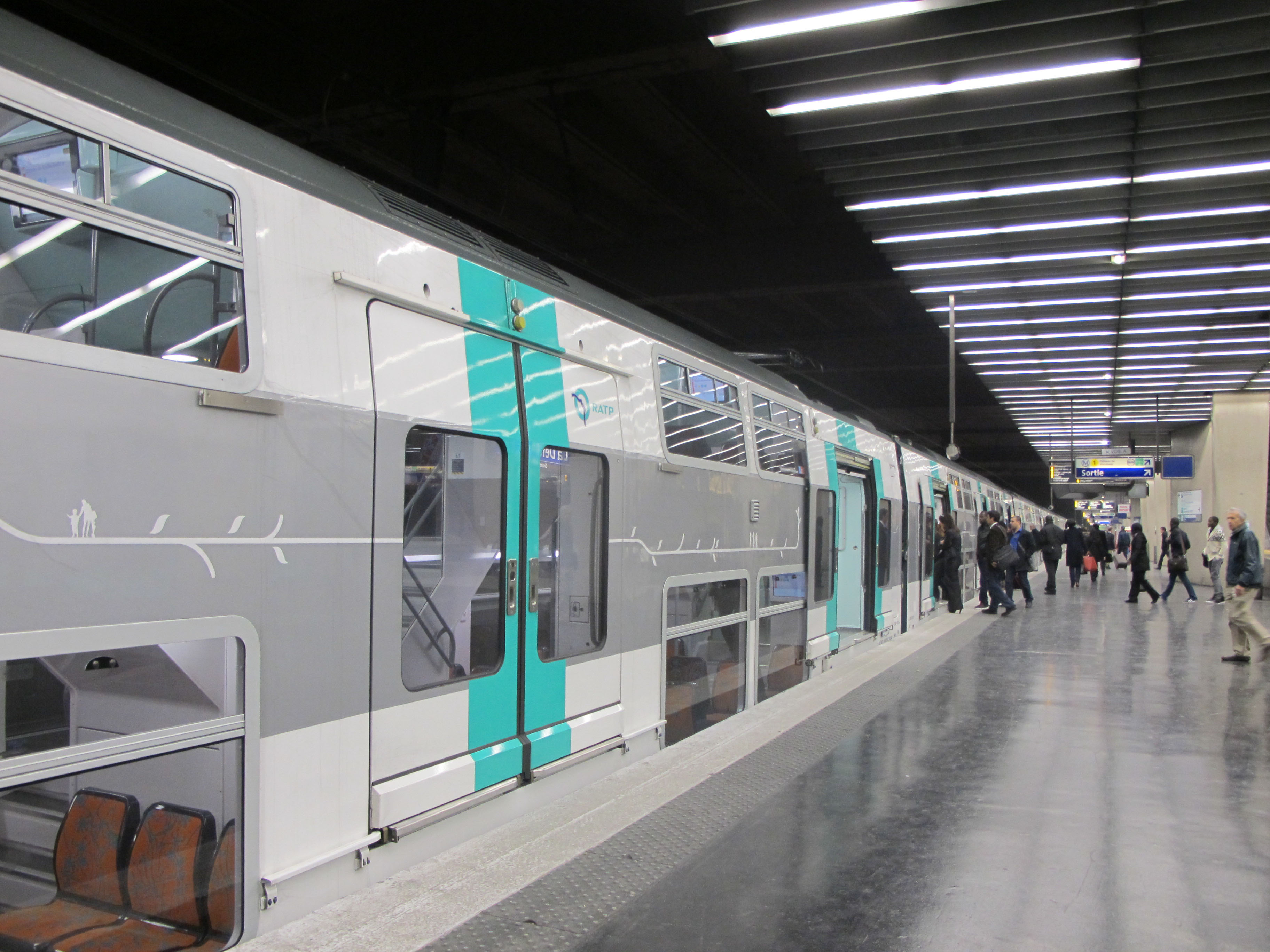 Rame MI09 du RER A, station La Défense, Ile de France. France